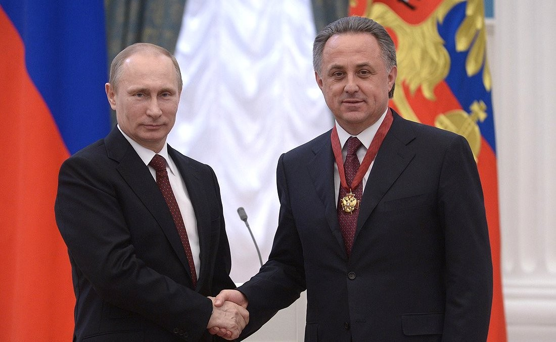 Вручение государственных наград Российской Федерации. Министр спорта Виталий Мутко награждён орденом «За заслуги перед Отечеством» III cтепени.